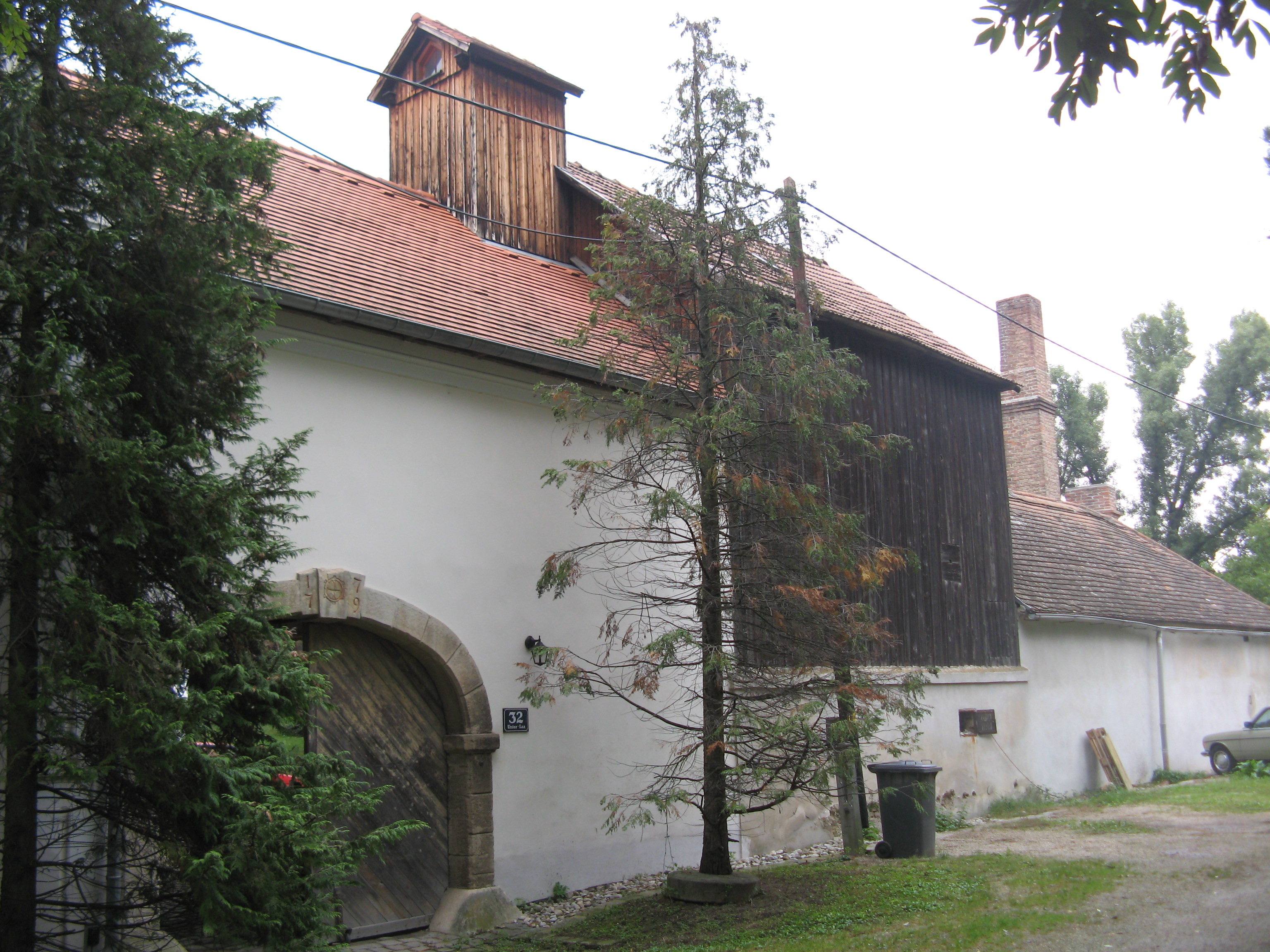 Alte Mühle (1779), Unterlaaer Platz 32, Wien-Favoriten